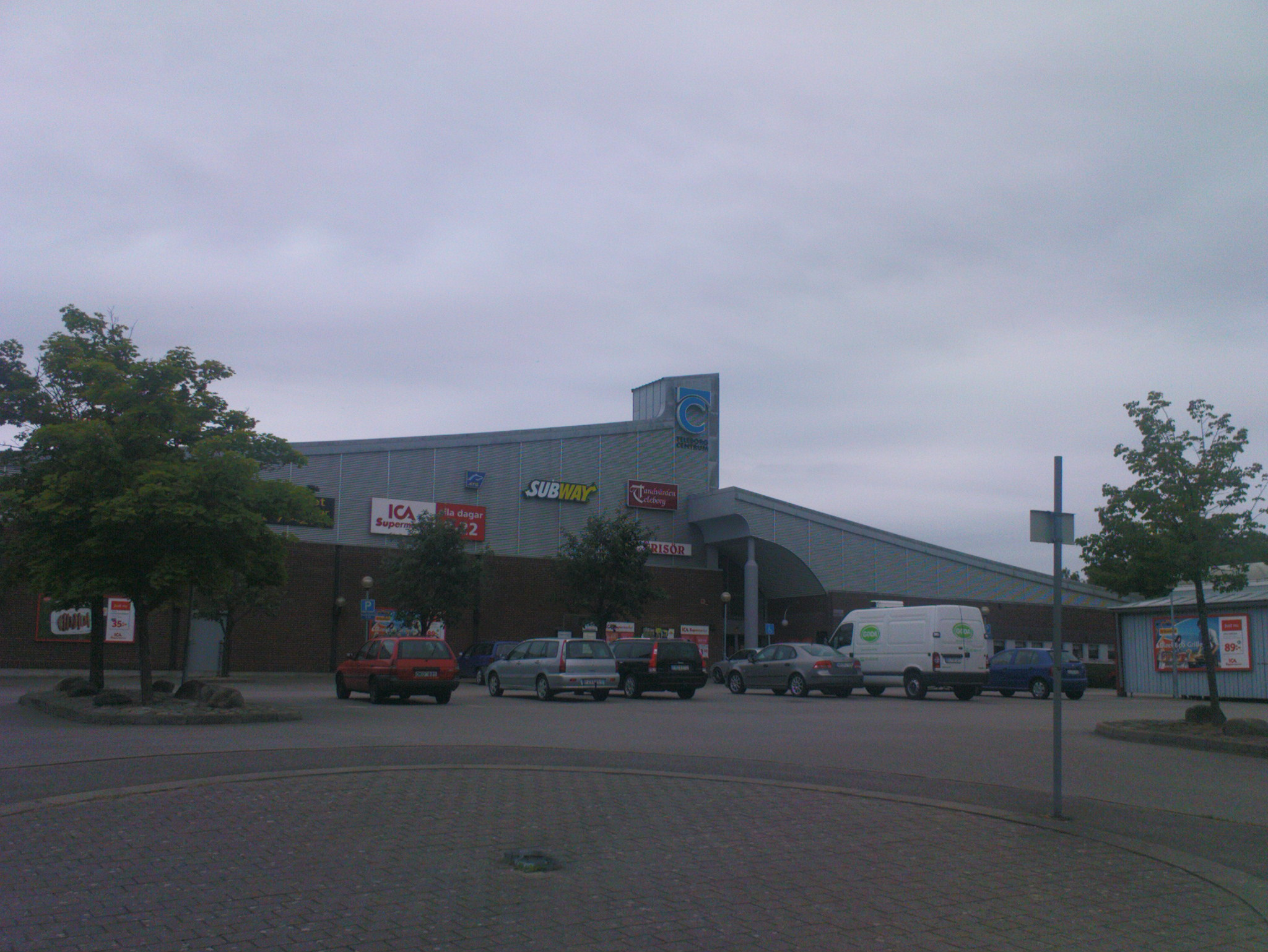 Teleborg Centrum.